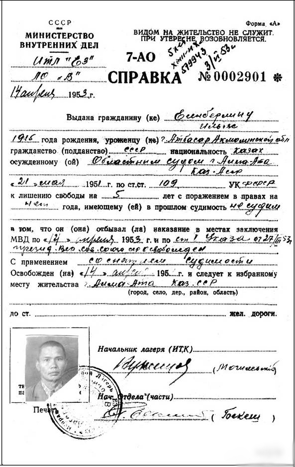 Справка об освобождении Ильяса Есенберлина. От 14.04.1953